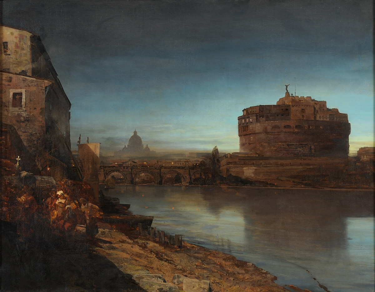 Ansicht des Tibers mit Blick auf die Engelsburg. Signiert. Datiert "82". Öl auf Leinwand, 80 x 100 cm